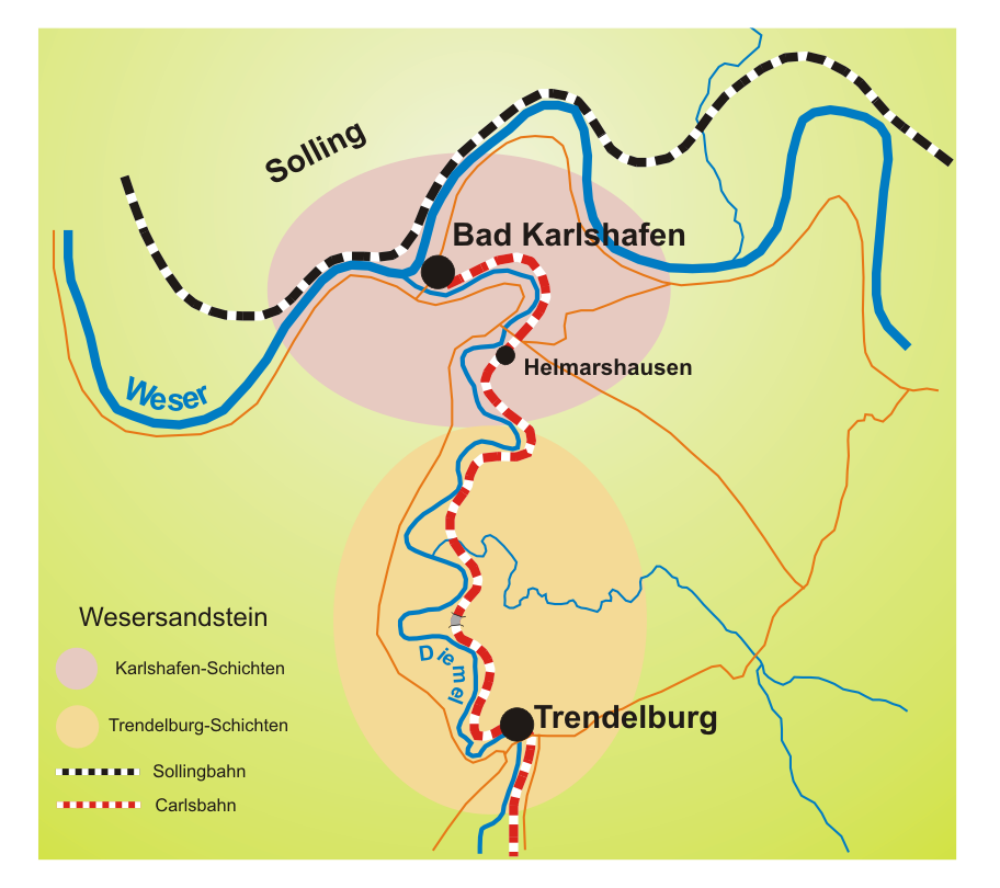 Verbreitung des Wesersandsteins Solling-Folge